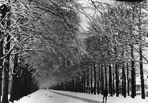 De Wipstrikkerallee in de wijk Wipstrik van Zwolle op 3 januari 1893 tussen 12:00 en 13:00 uur.